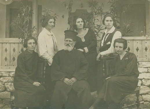 Групова снимка на семейството на свещеник Павел Атанасов в с. Ези бей (Паскалево), Добричко.